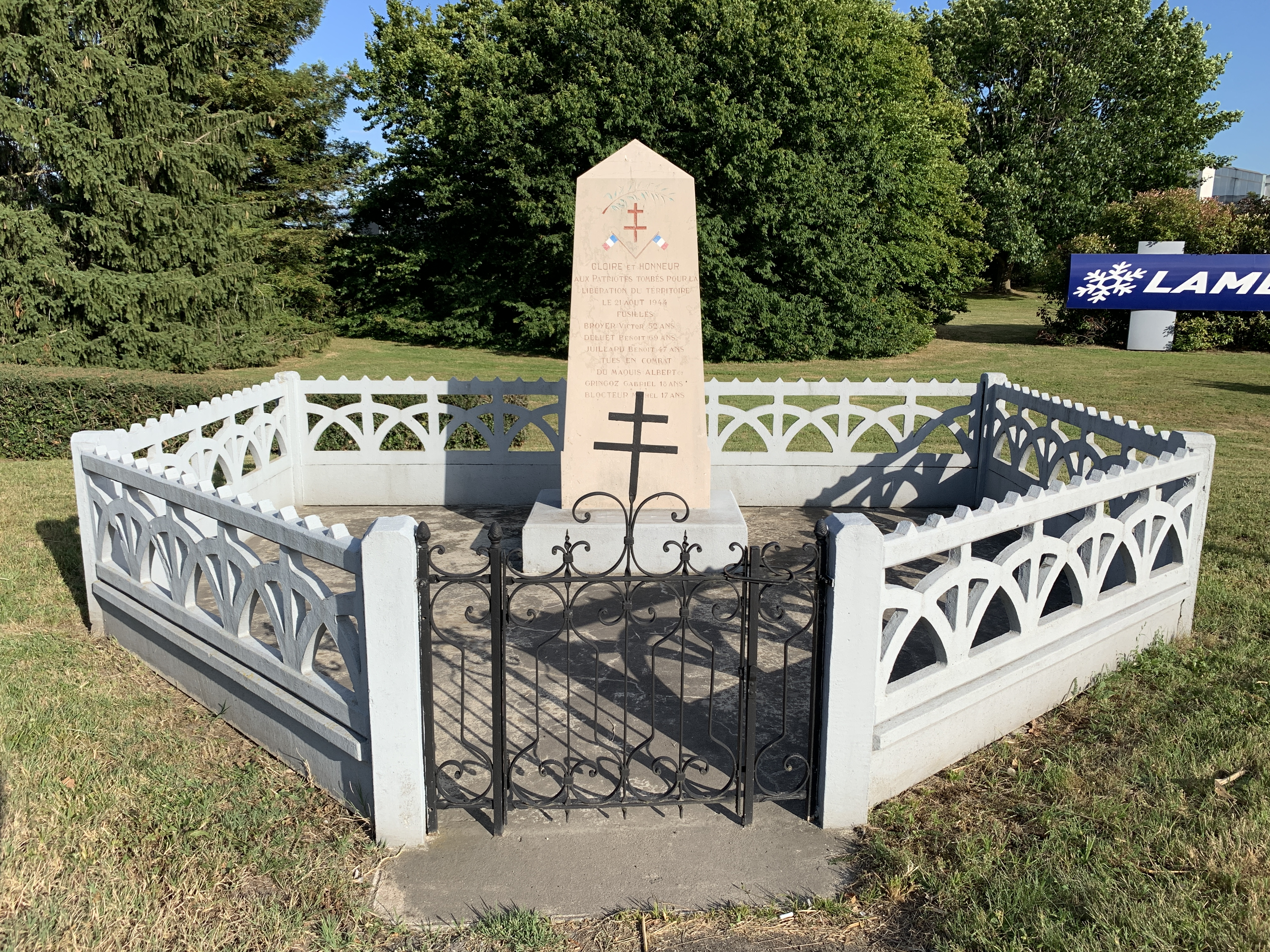 Monument aux morts de la Tuilerie en mémoire des événements du 21 août 1944, Saint-Cyr-sur-Menthon.